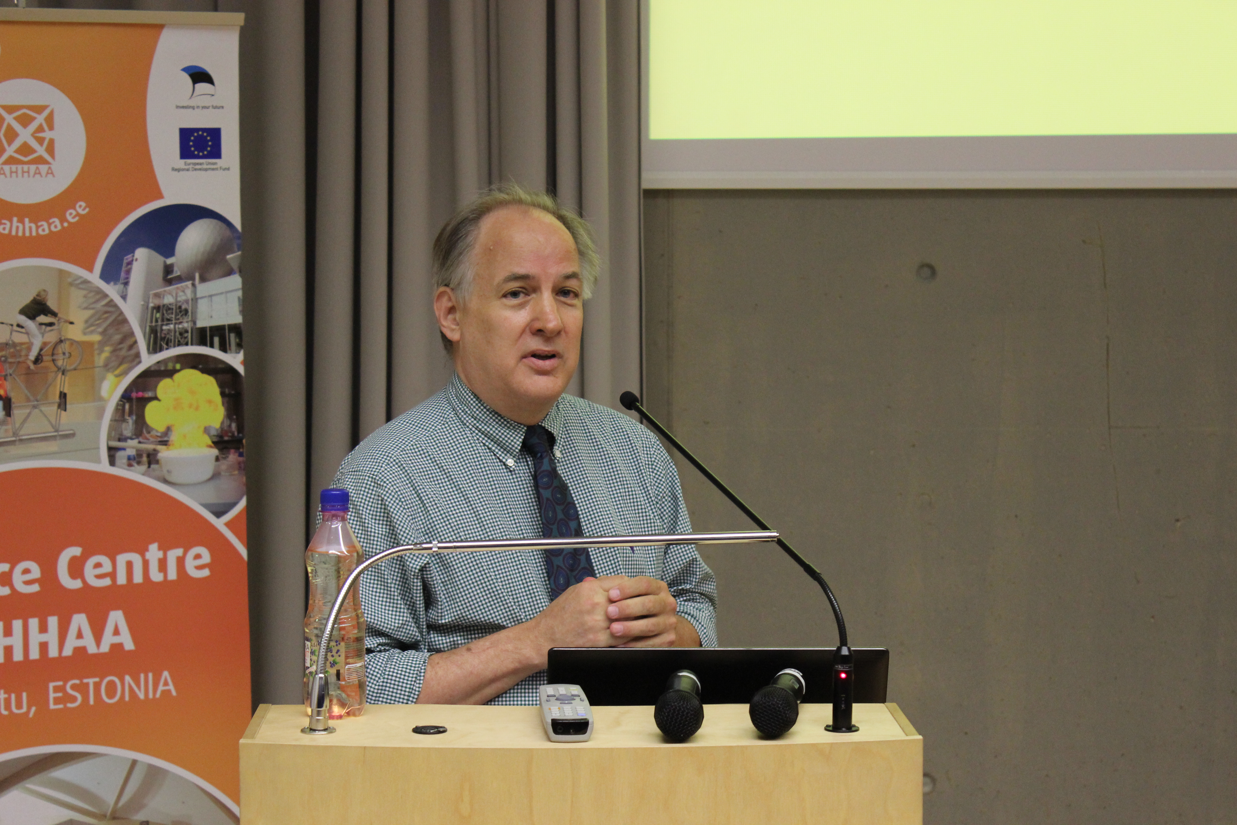 Michael Gallagher Mõtlemiskonverentsil AHHAA keskuses.